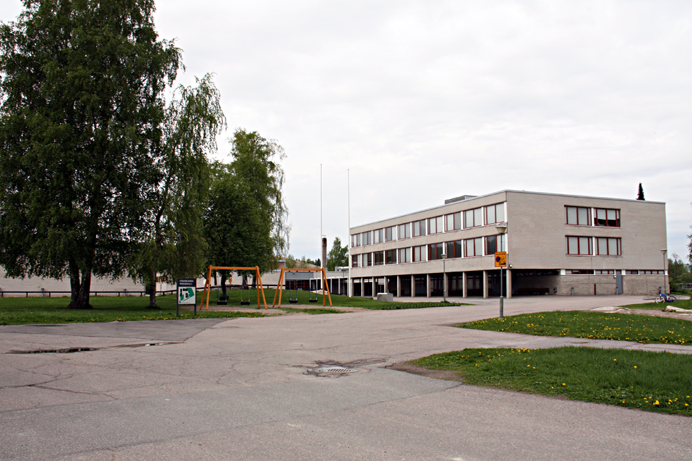 Itäkeskuksen peruskoulu Olavinlinnantien suunnasta kuvattuna